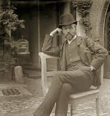 Jacques de Lalaing (peintre et sculpteur)